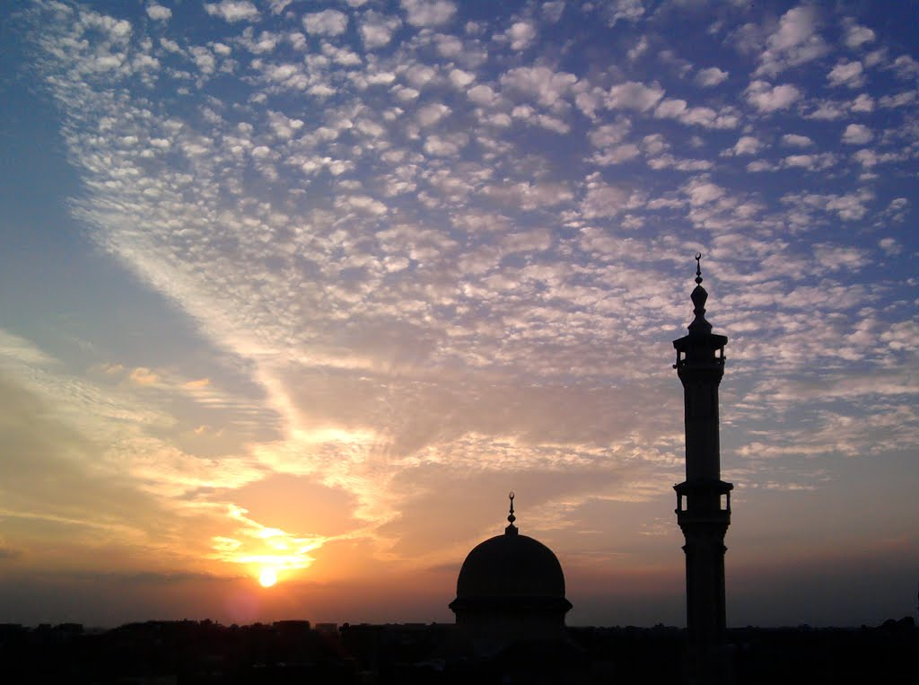 صورة توضح أكبر المساجد بتمي الأمديد